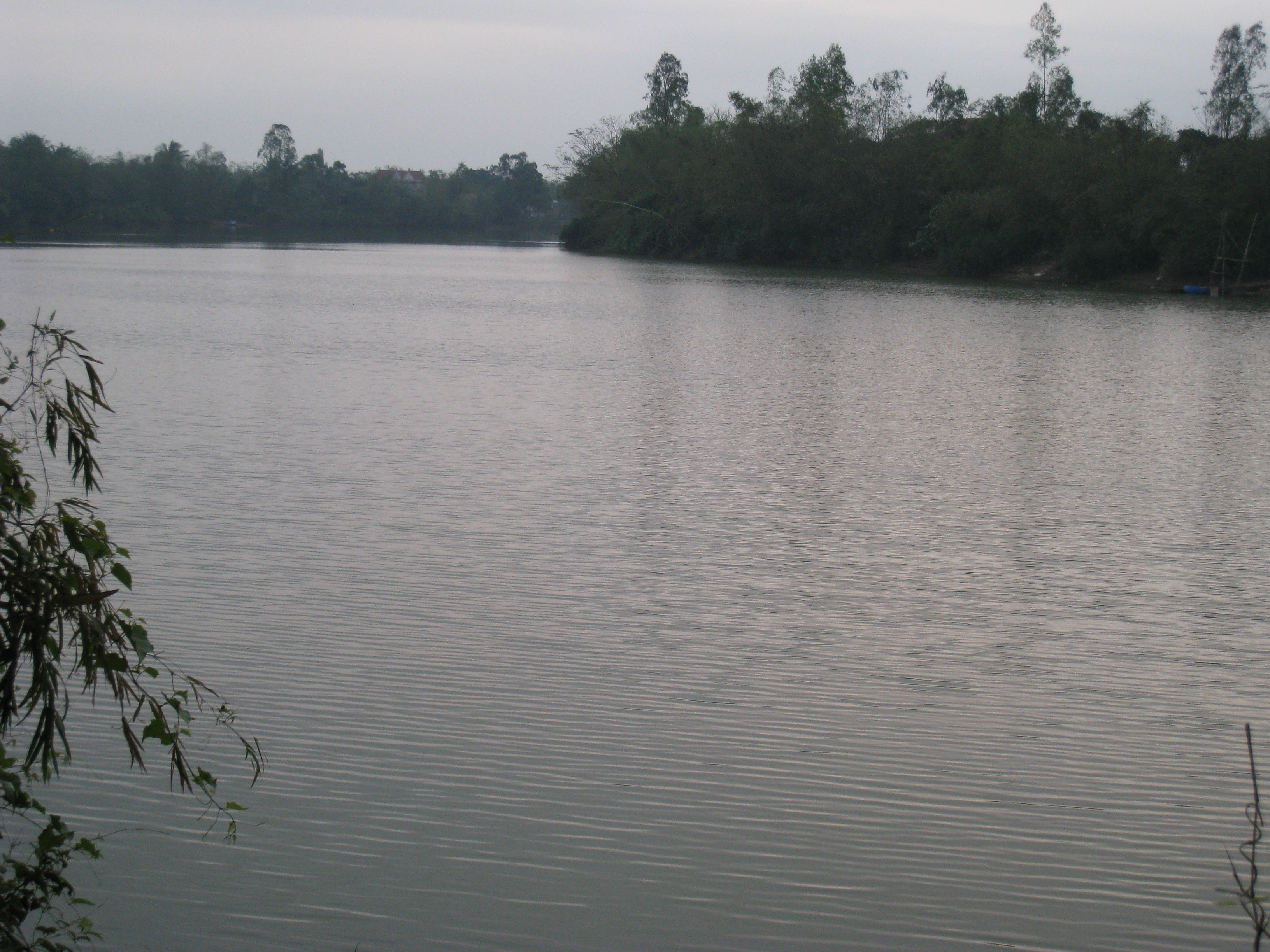 Kien Giang River in Le Thuy, Quang Binh, Vietnam